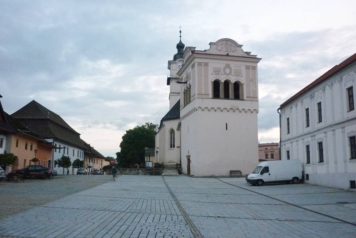 Spišská Sobota - Slovensko